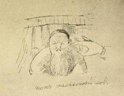 Рисунок из черновиков А. С. Пушкина, иллюстрация к «Сказке о попе и о работнике его Балде»